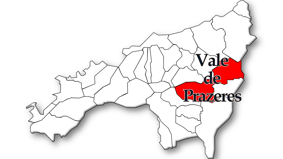 População